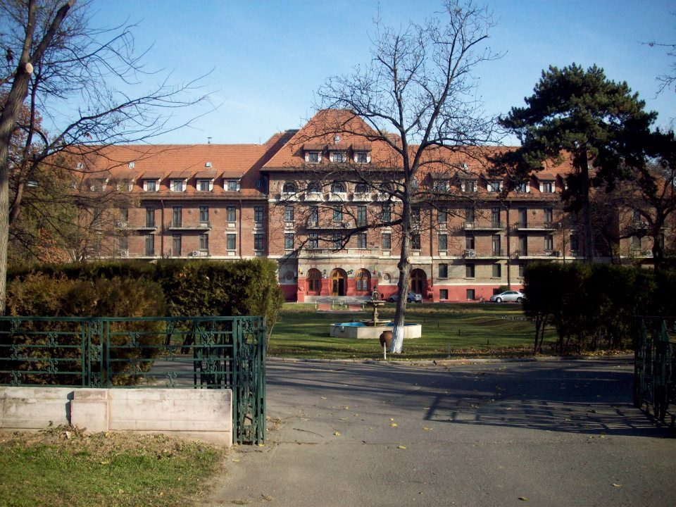 Bucarest Romania 2009